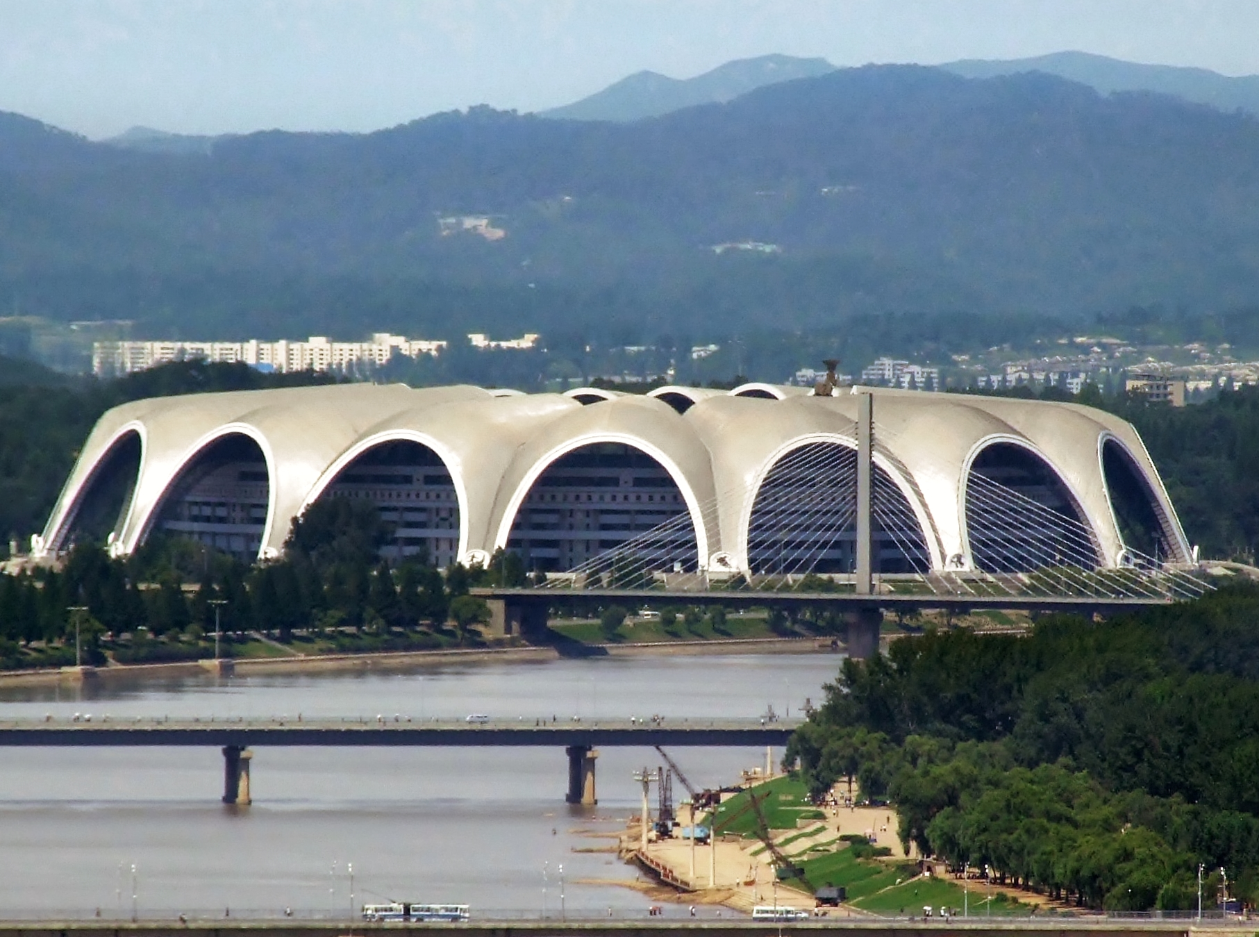 Blick vom Yanggakdo International Hotel